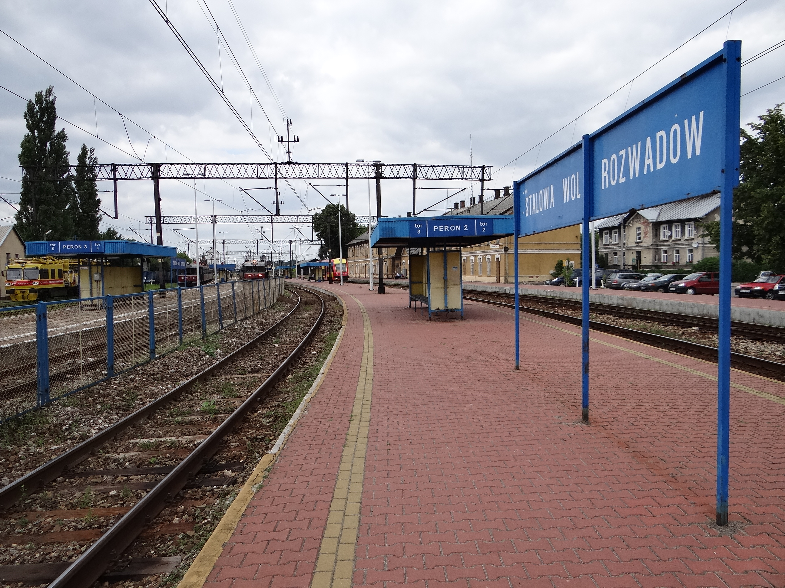 Stacja PKP Stalowa Wola Rozwadów.